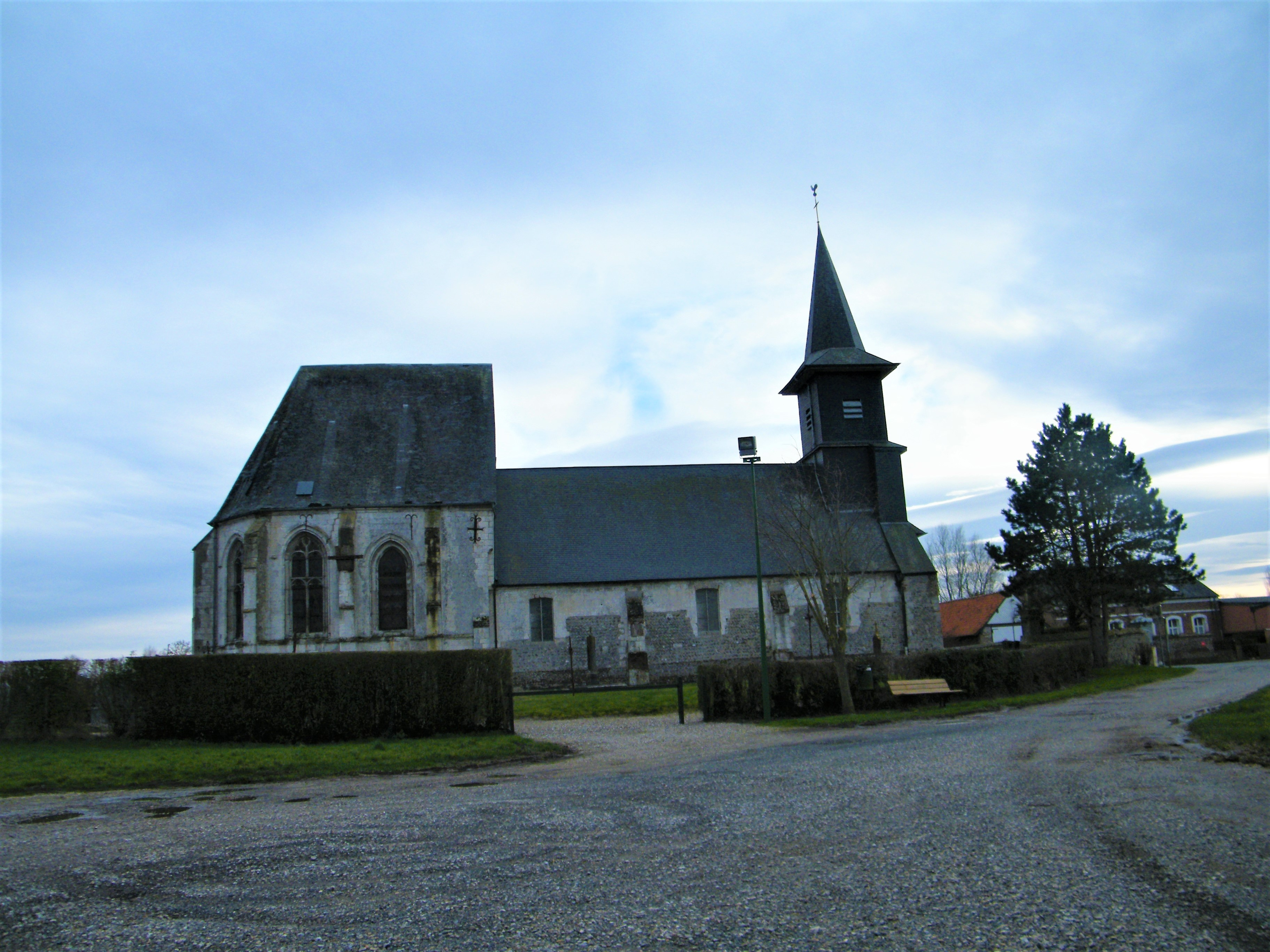 L'église de Favières (80).